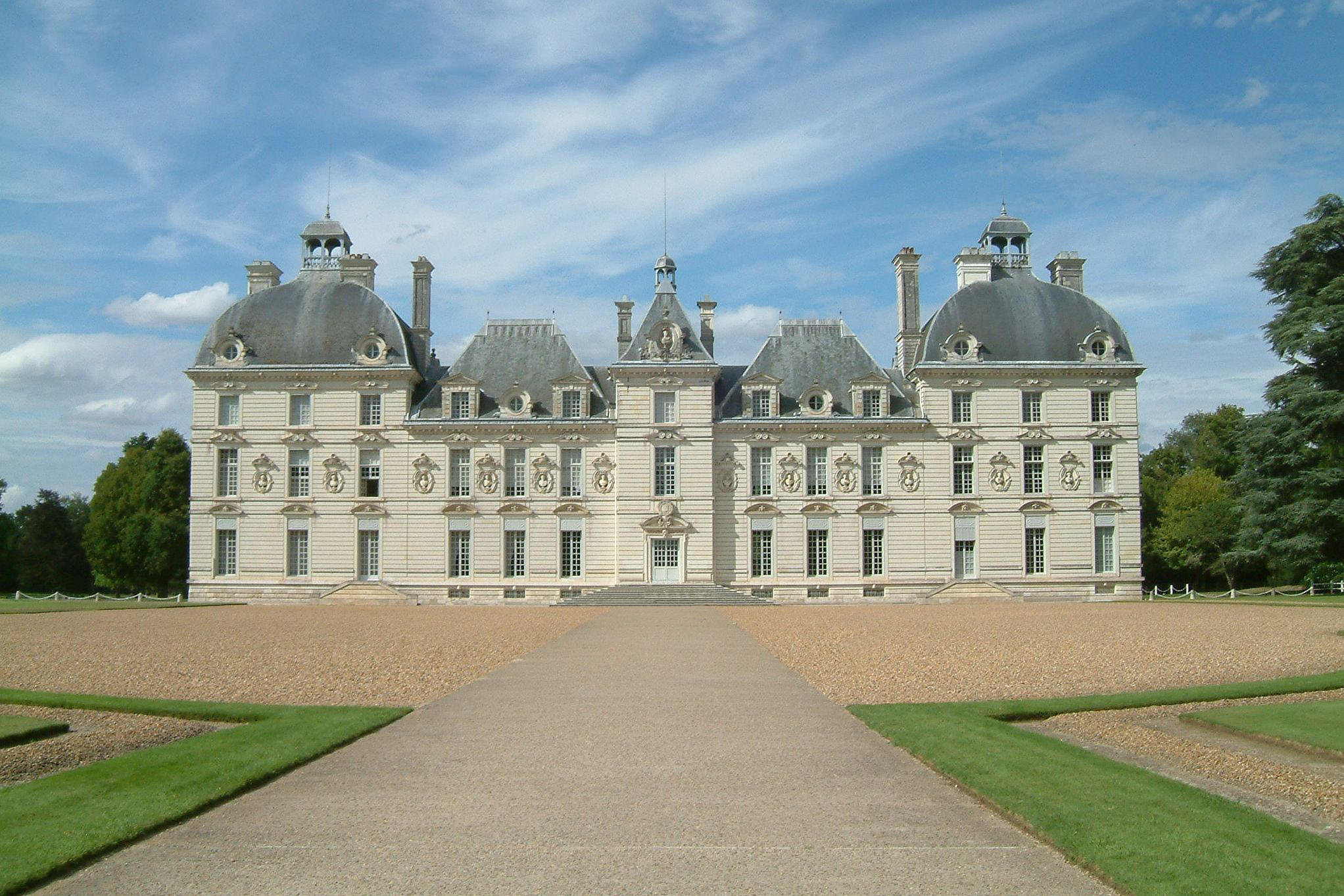 Château de Cheverny, vue de face,FRANCE